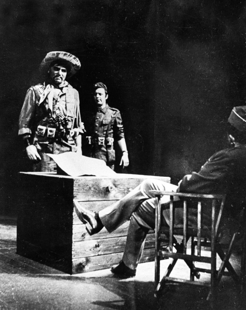 Primož Kozak, Legenda o svetem Che, Drama SNG v Ljubljani. Na fotografiji: Bert Sotlar (Ramon), Ali Raner (Peter).